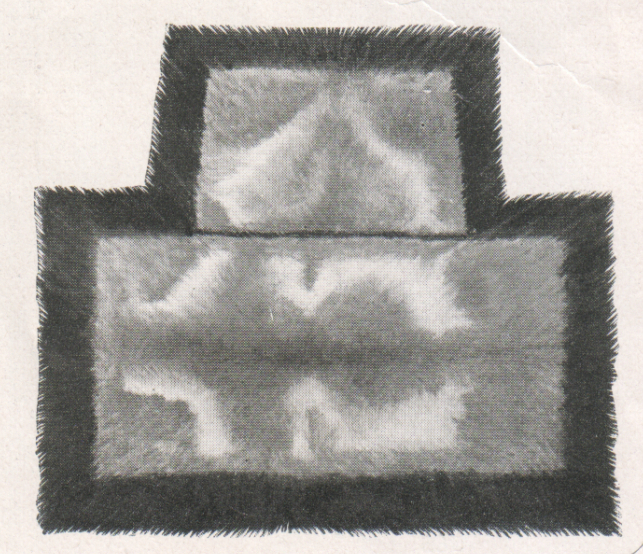 C. A. Herpich Söhne, Berlin, Modewaren 1910 (Prospekt), Ausschnitt Guanako-Schreibtischvorlage.